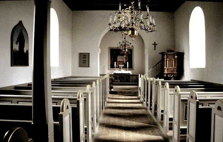 Skjøed Kirke, kirkerummet